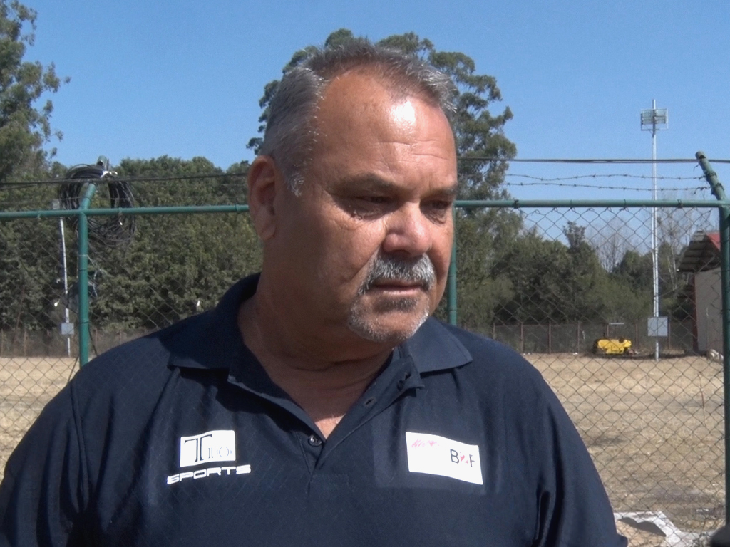 नेपाली: Dav Whatmore in Nepal as Coach of National Cricket Team. नेपाली: नेपाली क्रिकेटको प्रशिक्षकमा पुवुदु दासानायके पछि डेभ ह्वाटमोर